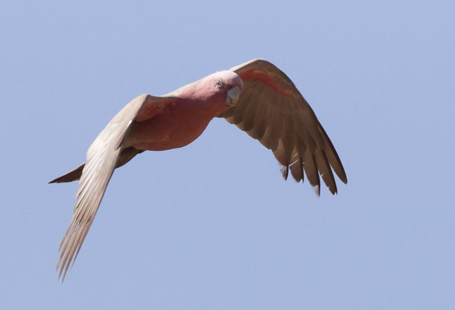 Galahs near water